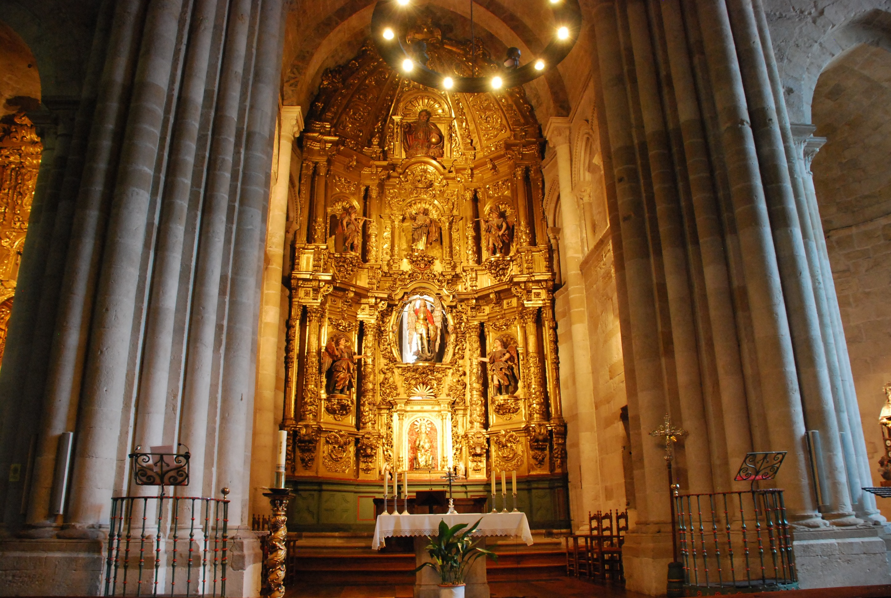 Retablo de la iglesia de San Miguel en Estella (Navarra, España)